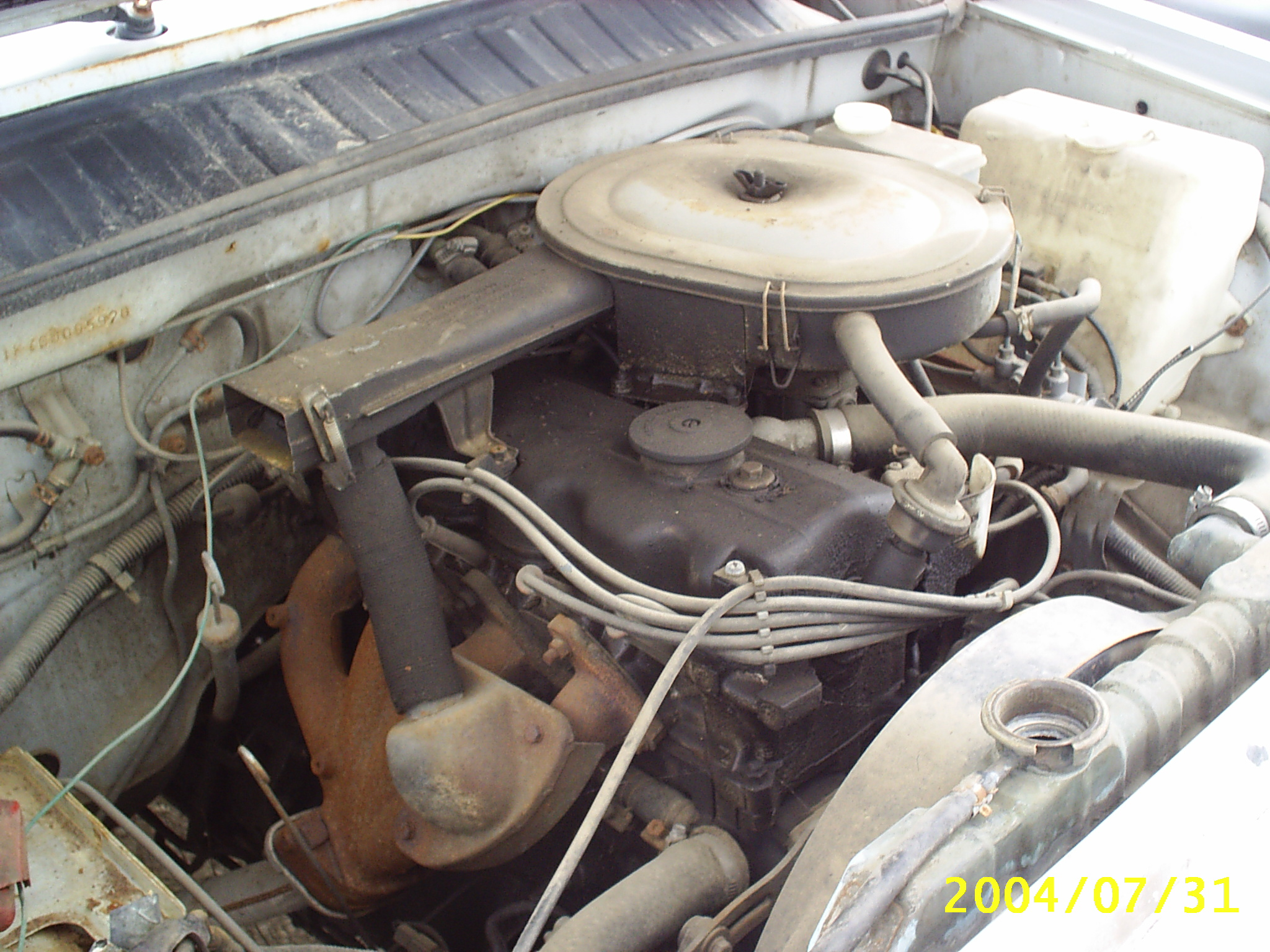 1.6 L Mitsubishi 4G32 inline four cylinder engine in a 1986 Hyundai Stellar.